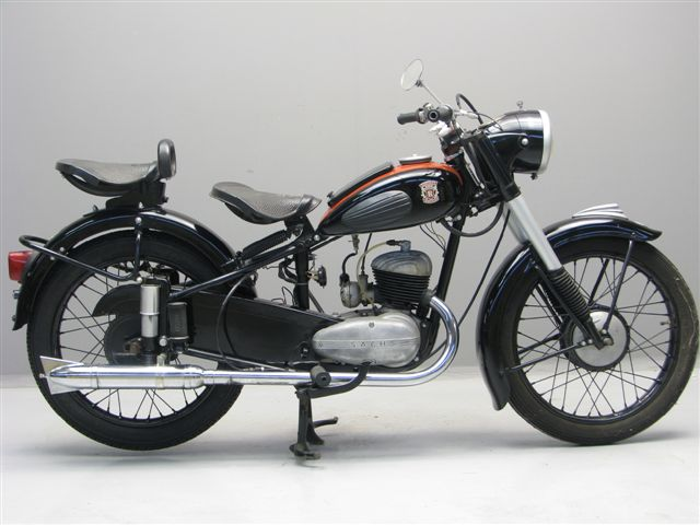 1952 Rabeneick motorcycle with a 147cc Sachs motor.